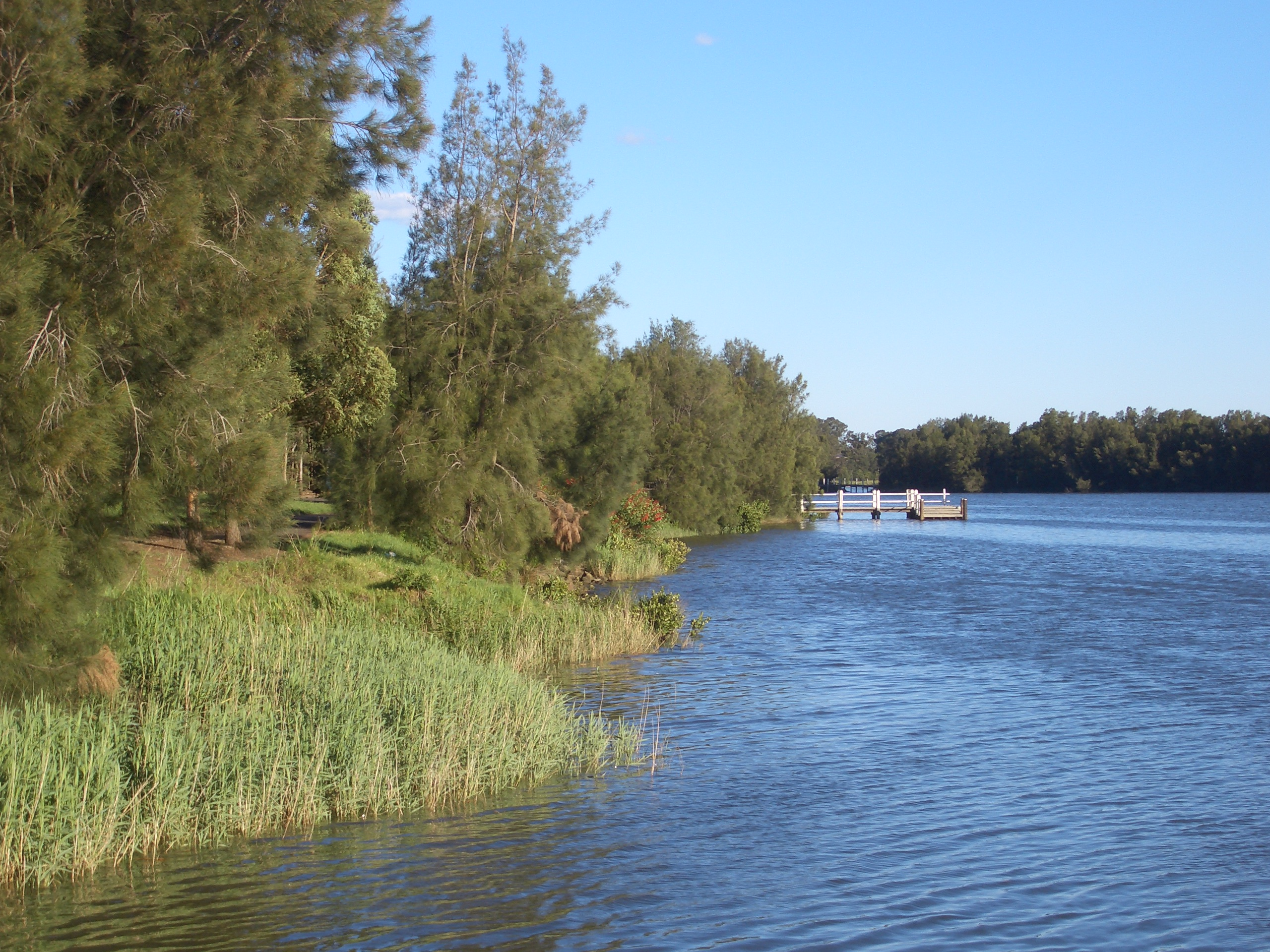 Lansvale, Floyd Bay